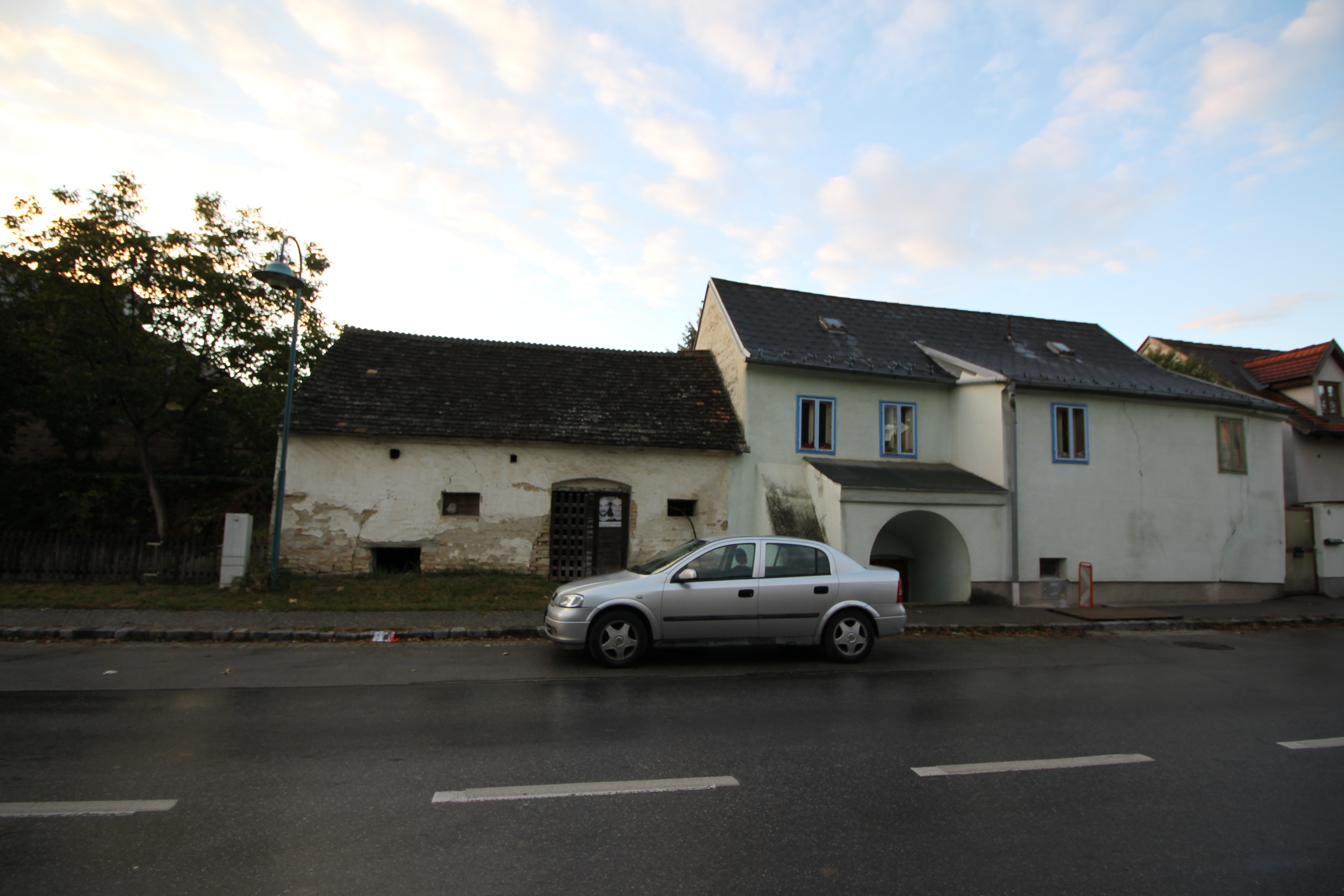 Kellergebäude in Obersdorf, Seyringerstraße